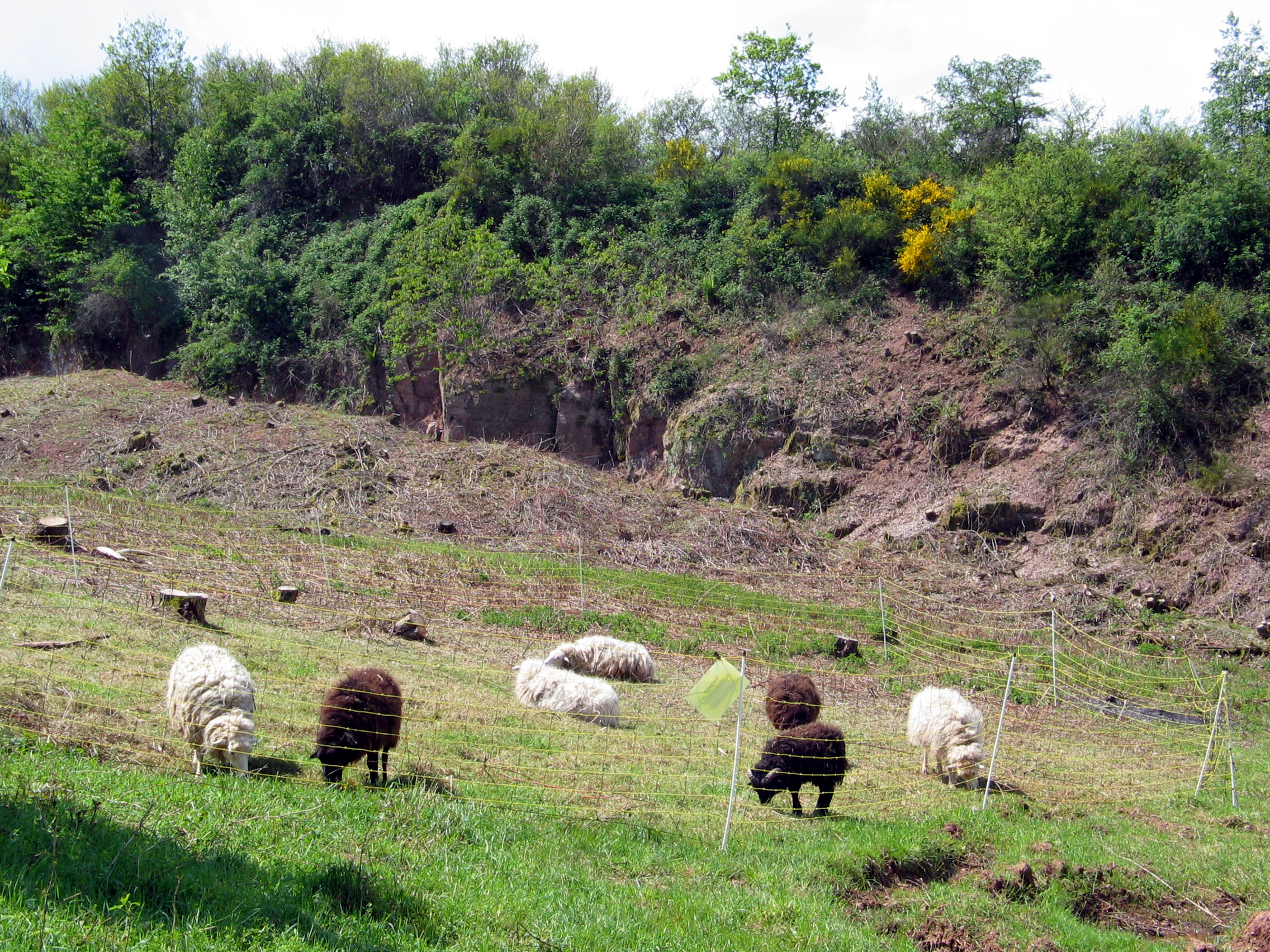 Biotop Kiesgrube Hirzweiler-Welschbach (Illingen (Saar))